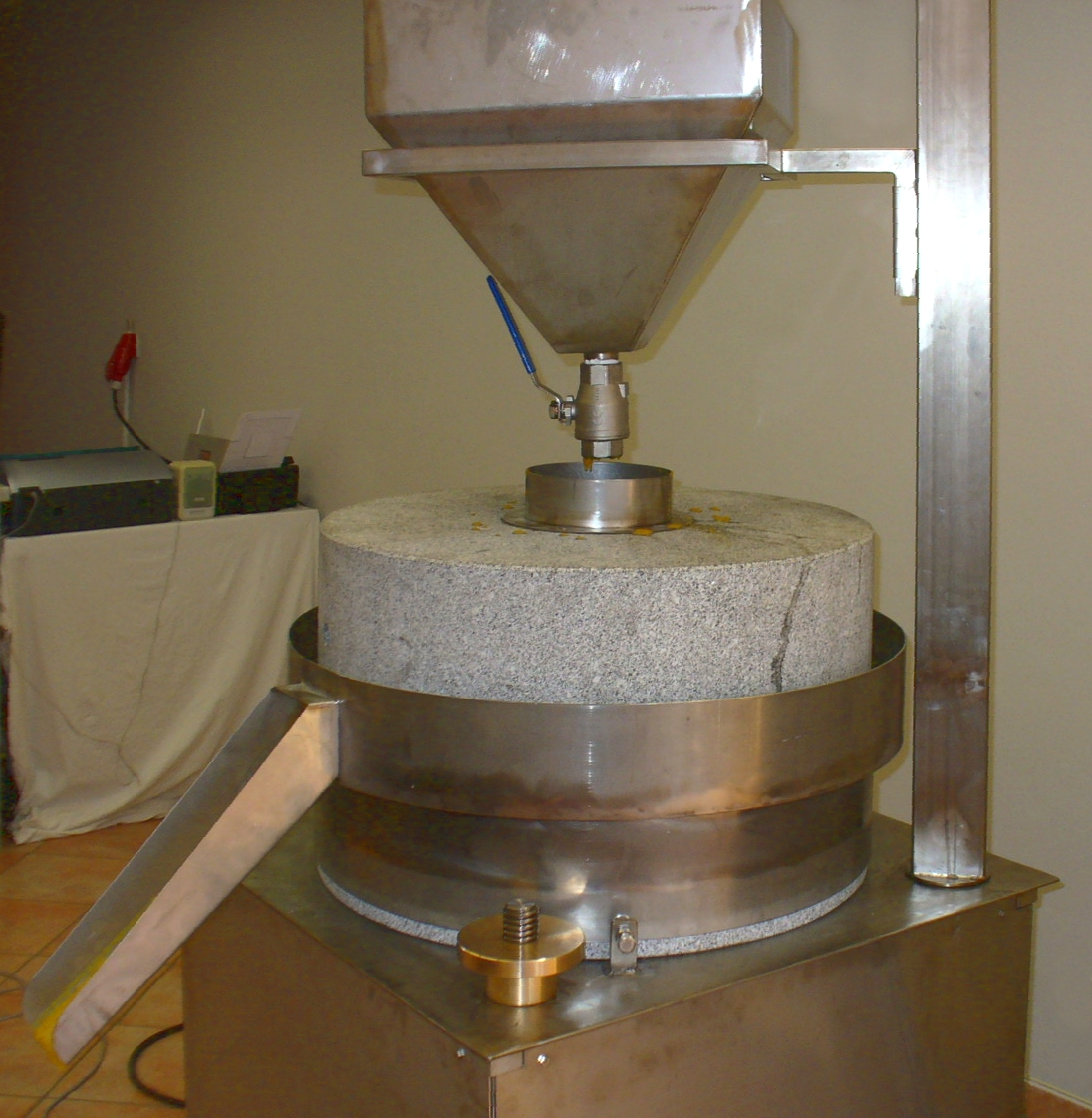 Senfmühle mit Granitsteinen nach historischem Vorbild. Angepasst an heutige hygienische Anforderungen.